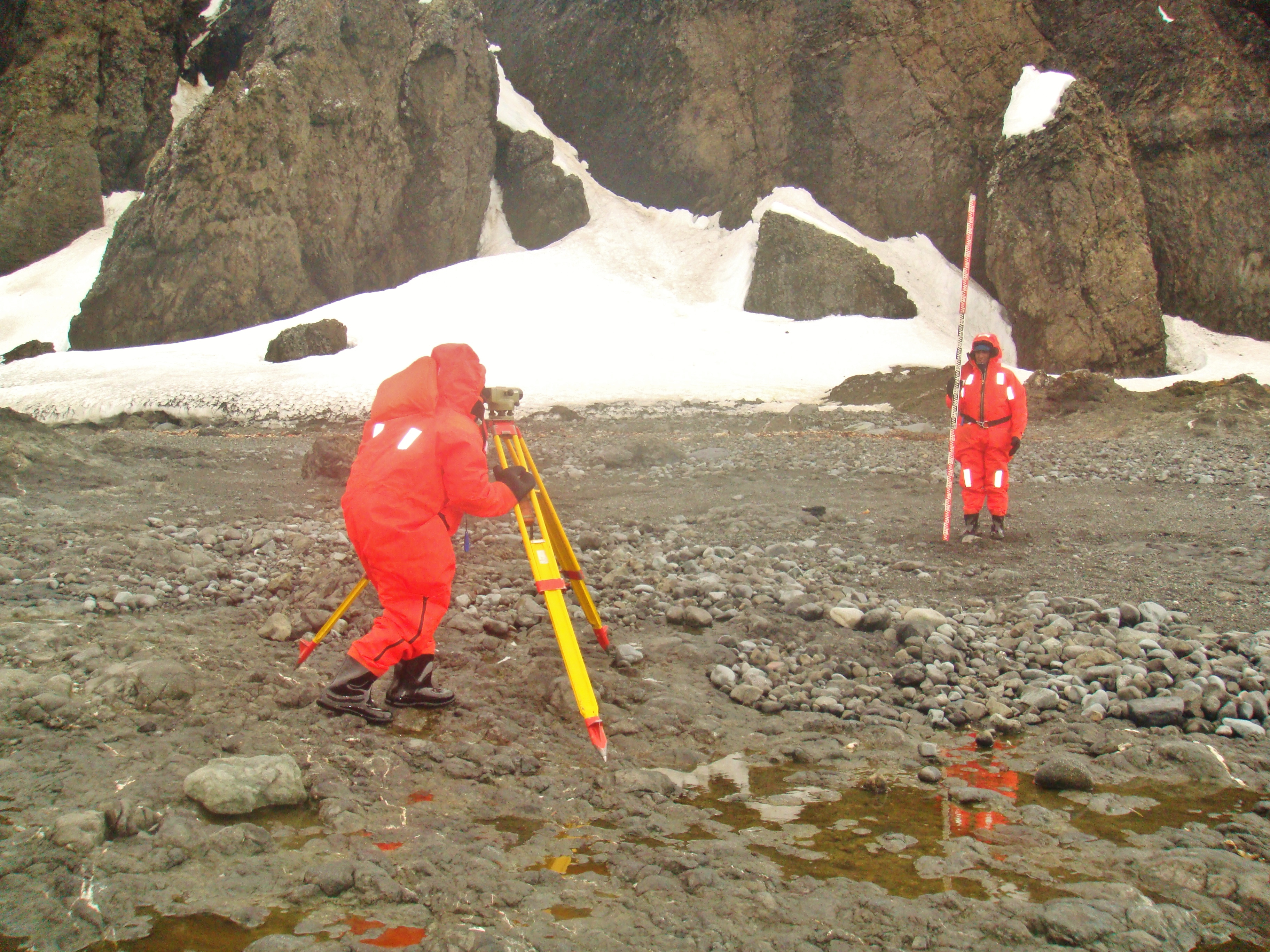 Campaña SOHMA